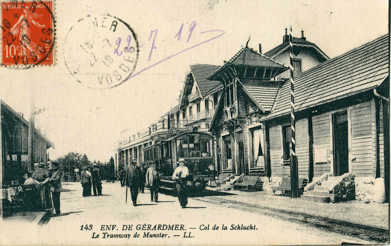 Carte postale ancienne éditée par LL, n°143 : ENVIRONS DE GÉRARDMER - Col de la Schlucht - Le Tramway de Munster